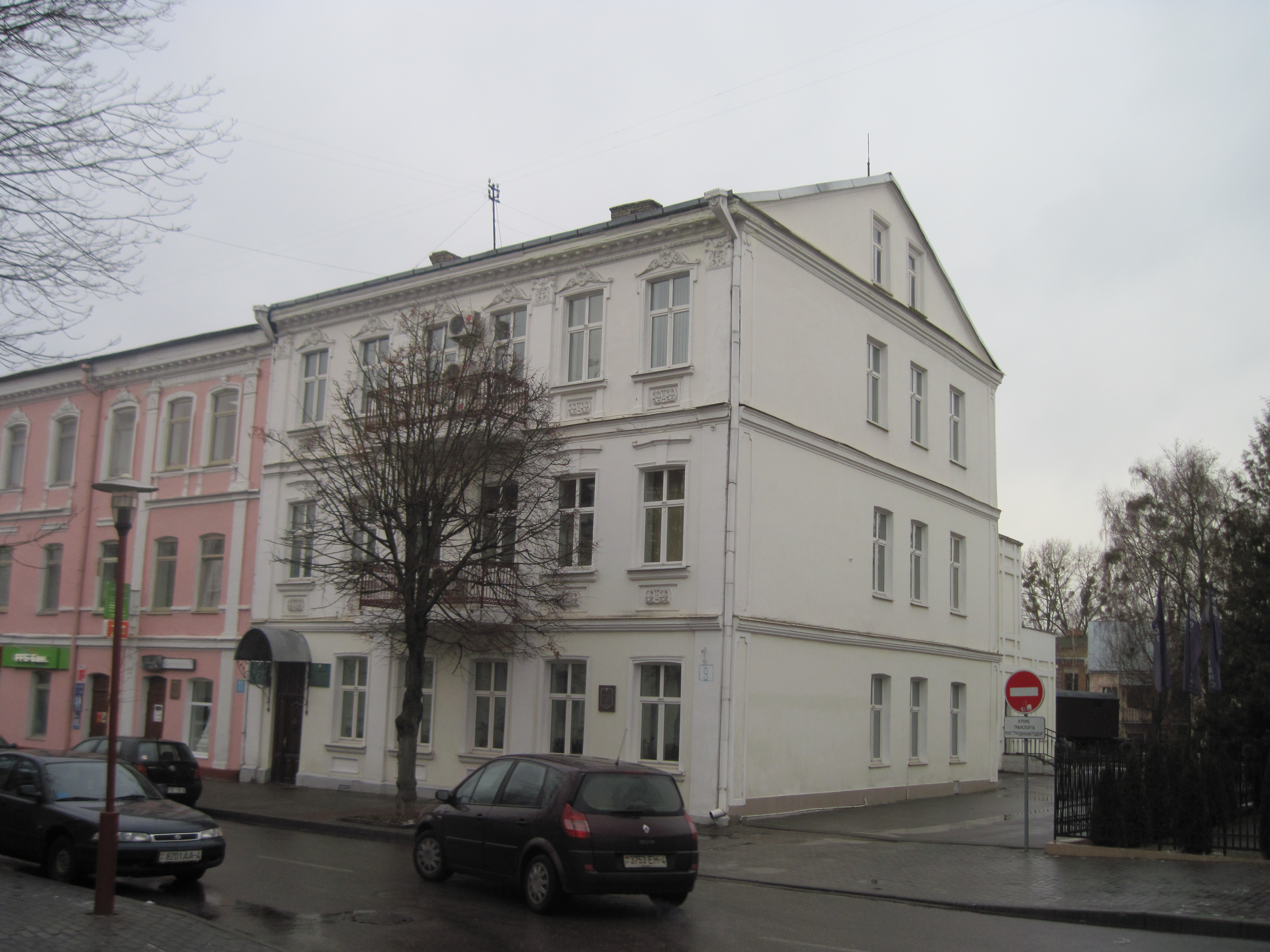 Беларуская (тарашкевіца): Будынак па вуліцы Замкавая, 9